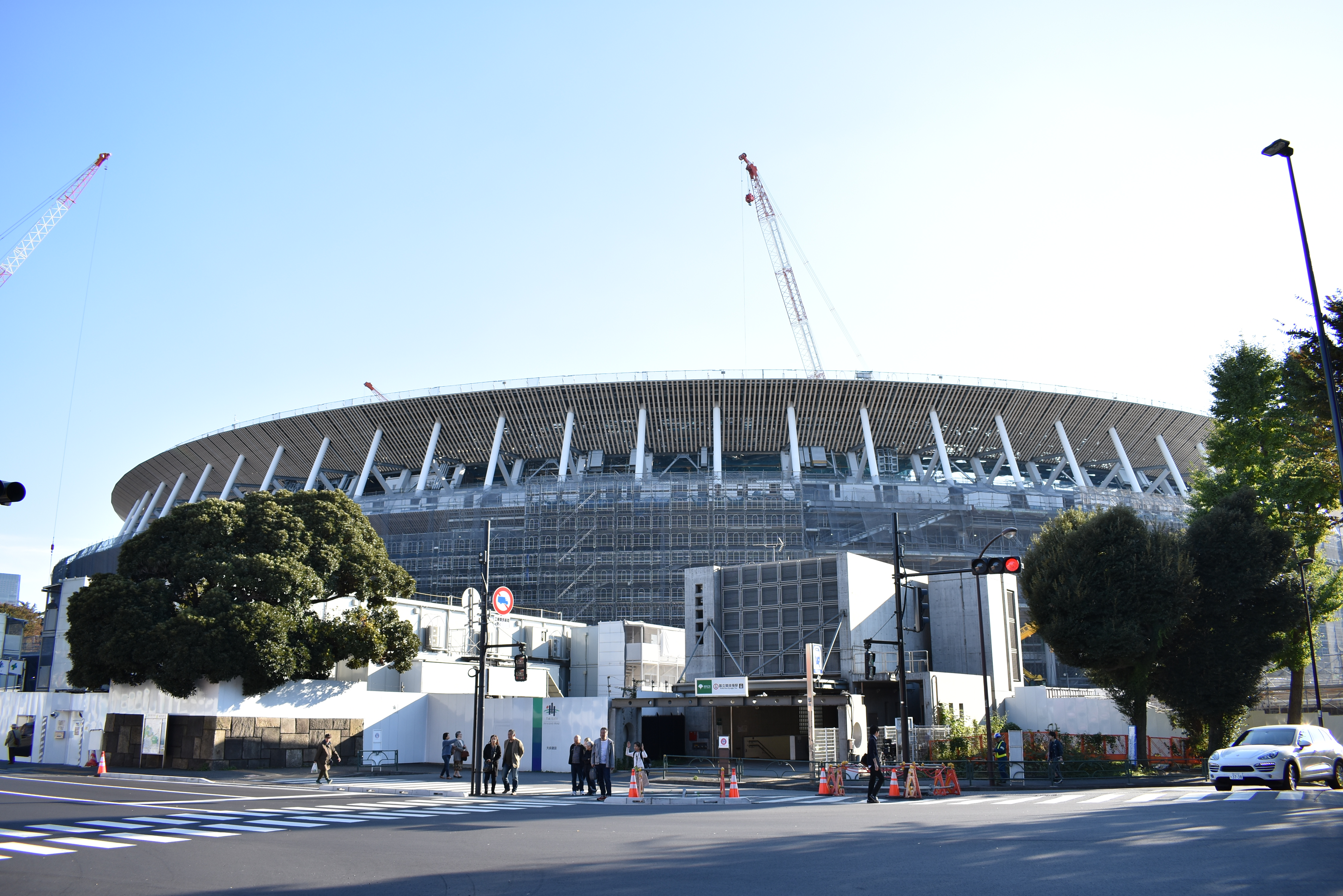 新国立競技場